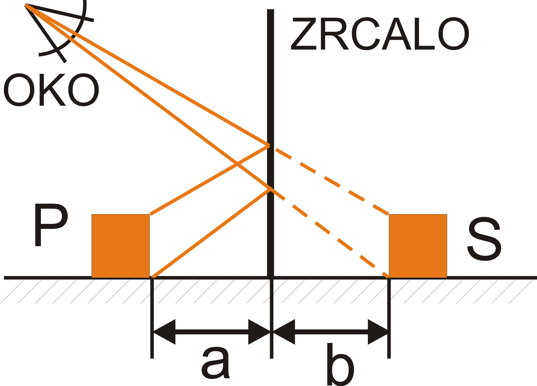 Pri ravnem zrcalu se žarki odbijejo pod kotom enakim vpadnemu kotu. Slika je navidezna in nastane na enaki razdalji kot predmet.